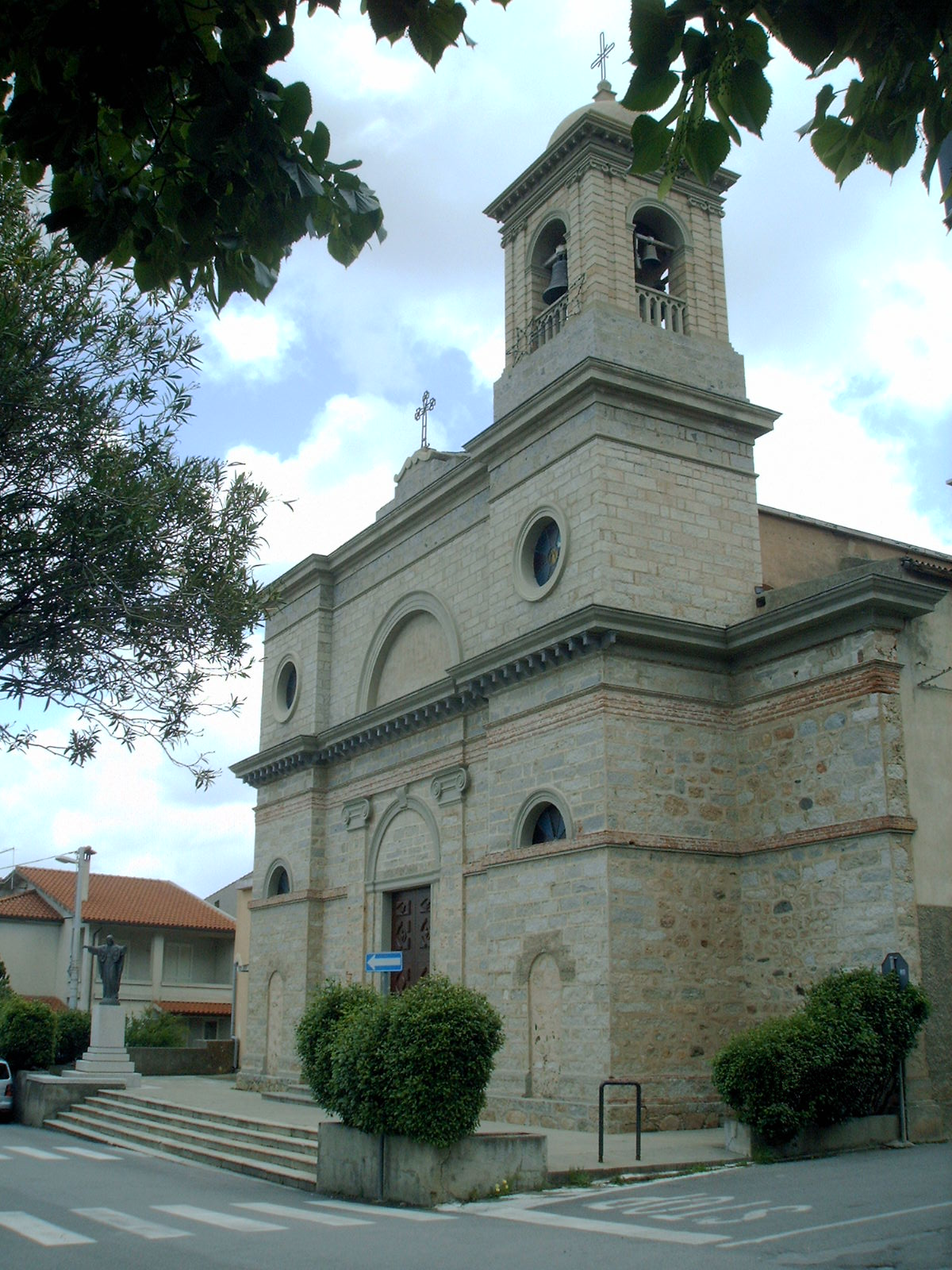 Chiesa parrocchiale del sacro cuore, Gonnosfanadiga